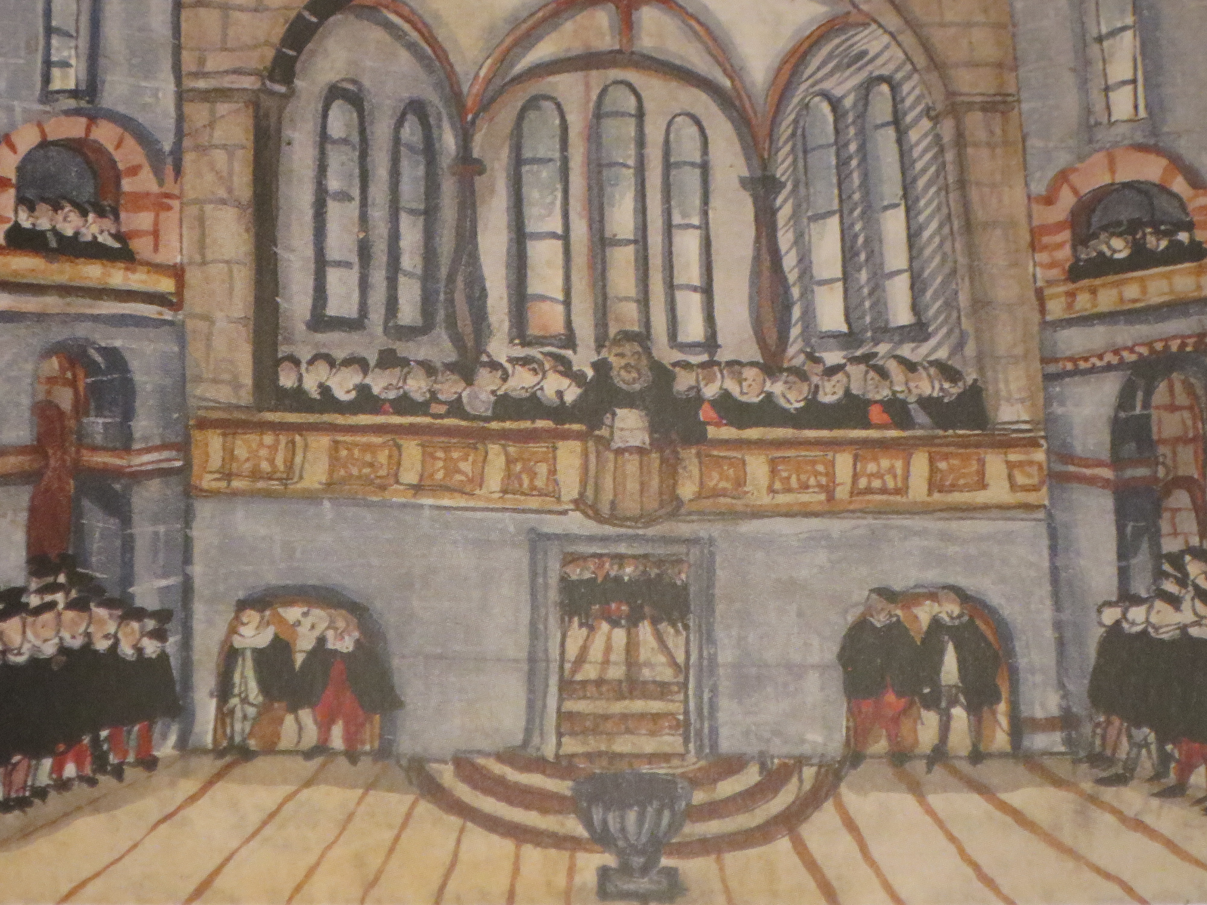 Grossmünsterkirche in Zürich mit Kanzellettner: Abschrift von Bullingers Reformationschronik, 1606